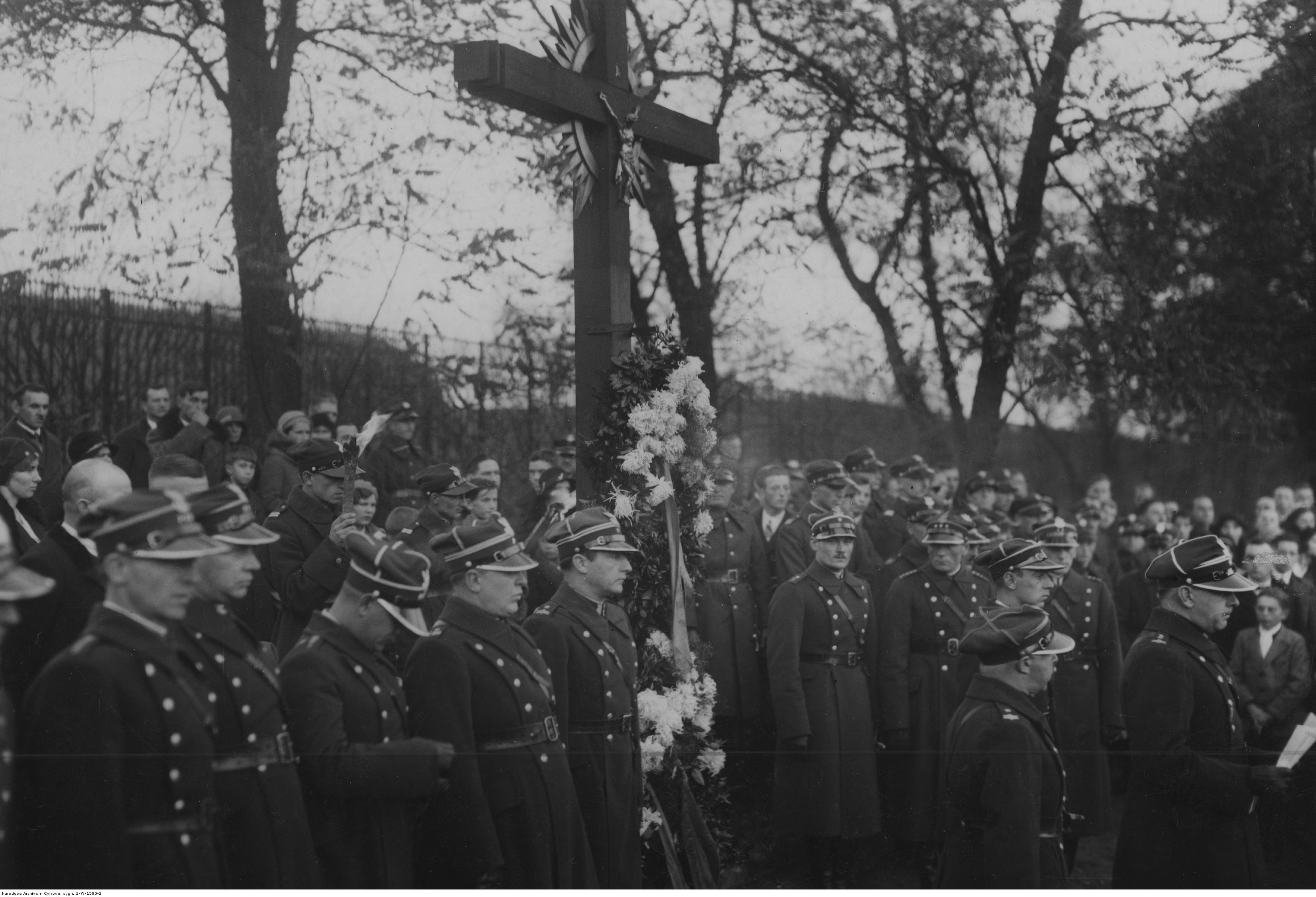 Apel poległych w uroczystość Wszystkich Świętych w 3 pułku lotniczym w Poznaniu na cmentarzu garnizonowym. Płk Władysław Kalkus odczytuje nazwiska poległych żołnierzy. Widoczni także mjr Antoni Wroniecki, mjr Bronisław Wojtarowicz, por. Królikowski. Koncern Ilustrowany Kurier Codzienny - Archiwum Ilustracji. Sygnatura: 1-W-1580-2